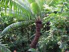 Sago palm